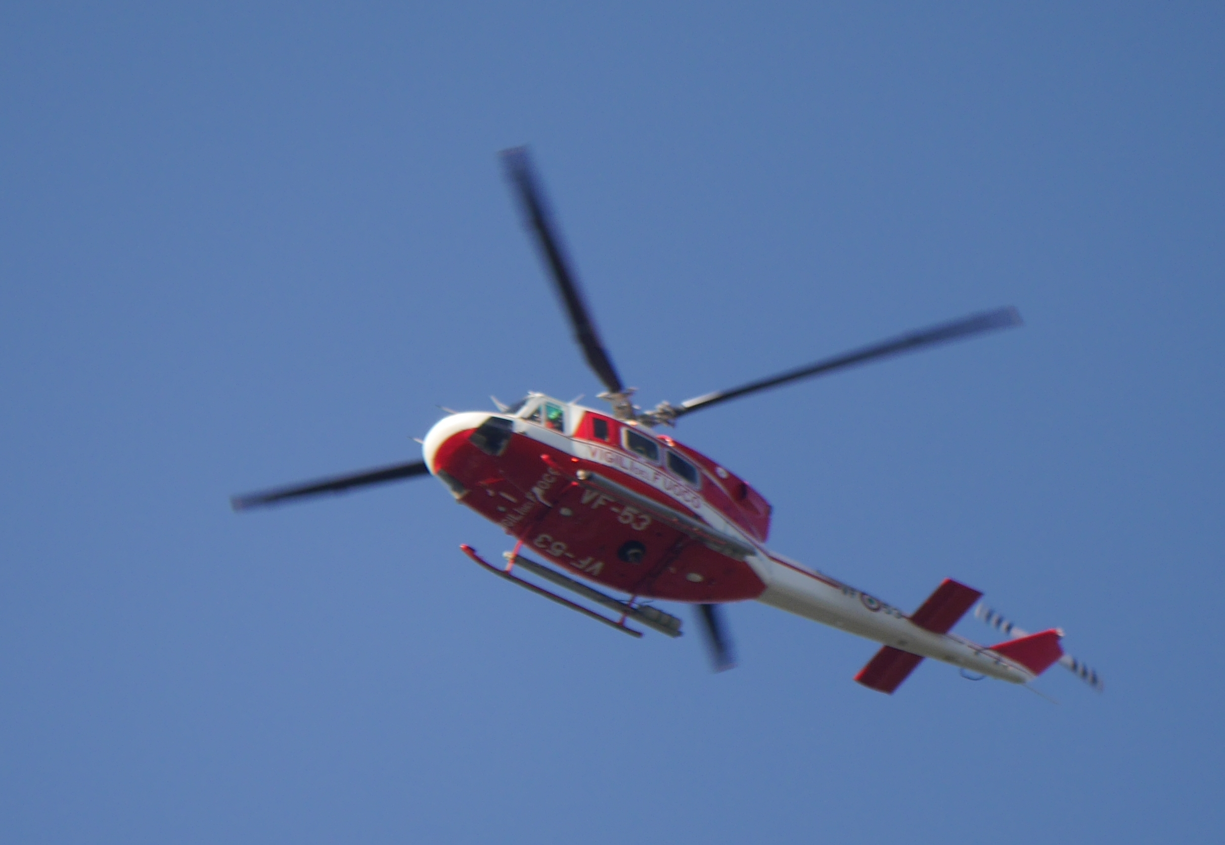 This photo was taken with Panasonic Lumix DMC-G6 camera, thanks to Panasonic. You can see all photographs in category: Taken with Panasonic Lumix DMC-G6.